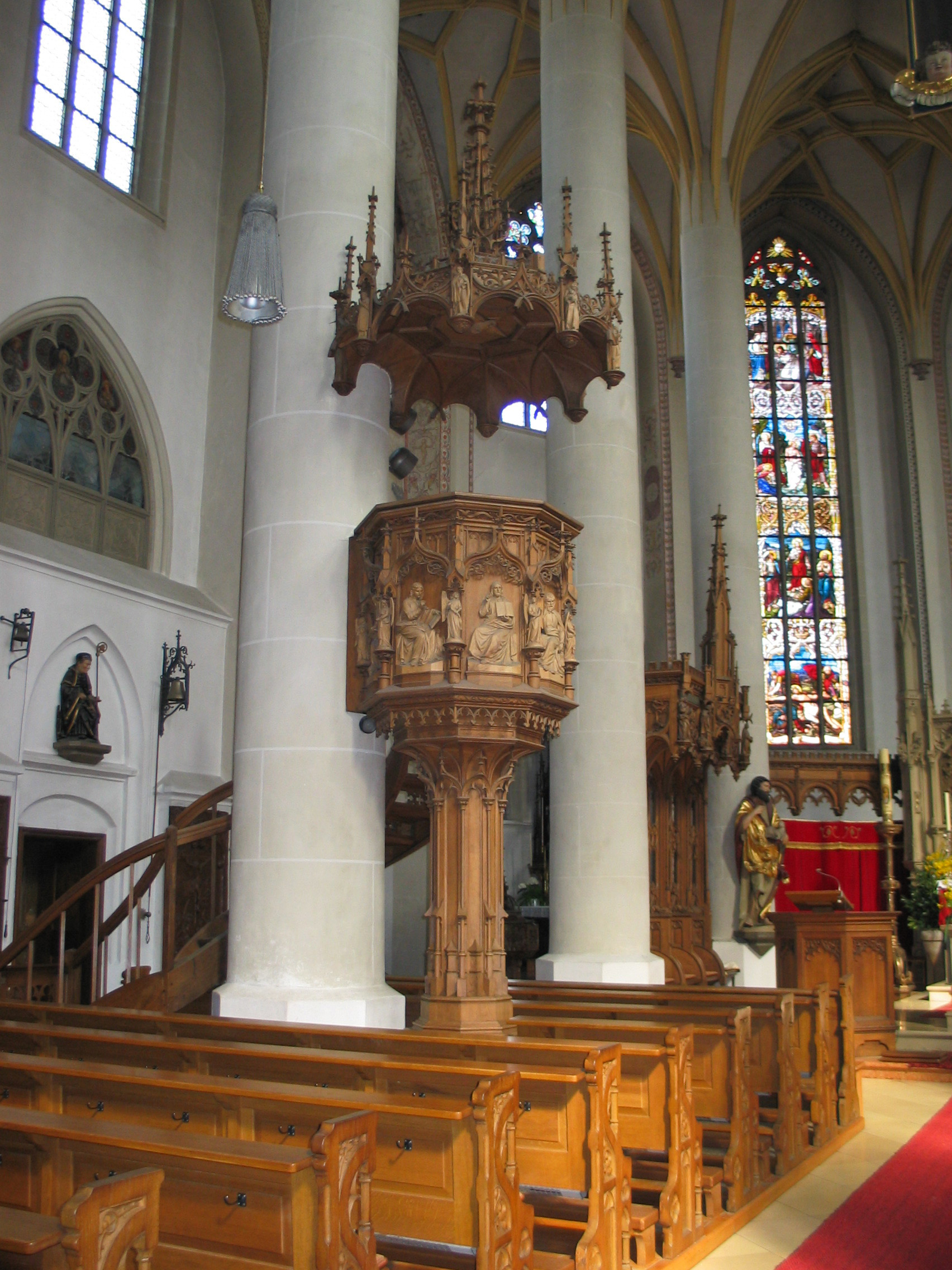 Dingolfing, Kath. Stadtpfarrkirche St. Johannes. Kanzel.